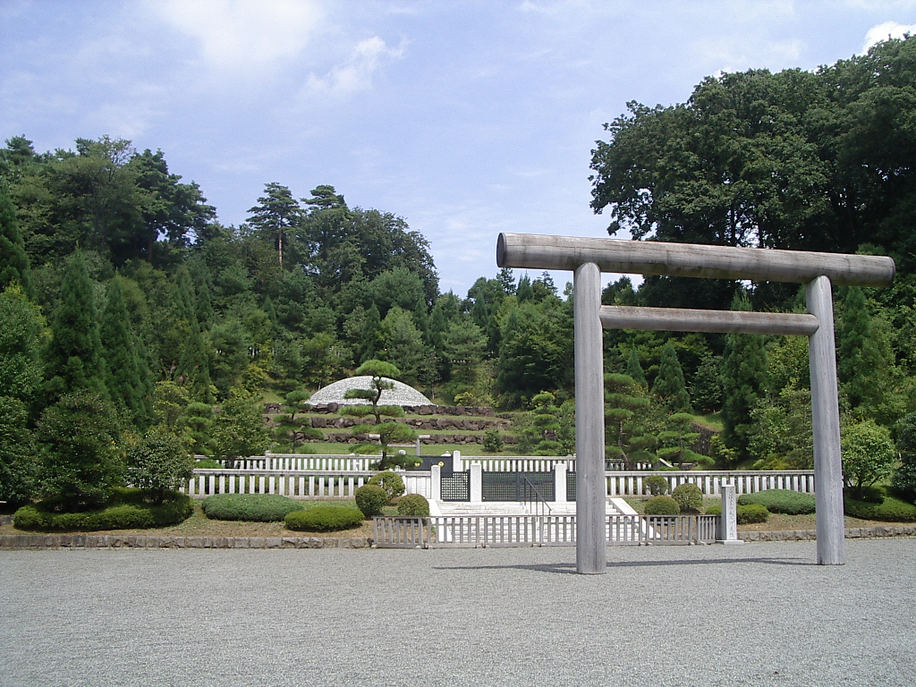 Imperial Mausoleum - Taishō Emperor(大正天皇)'s grave